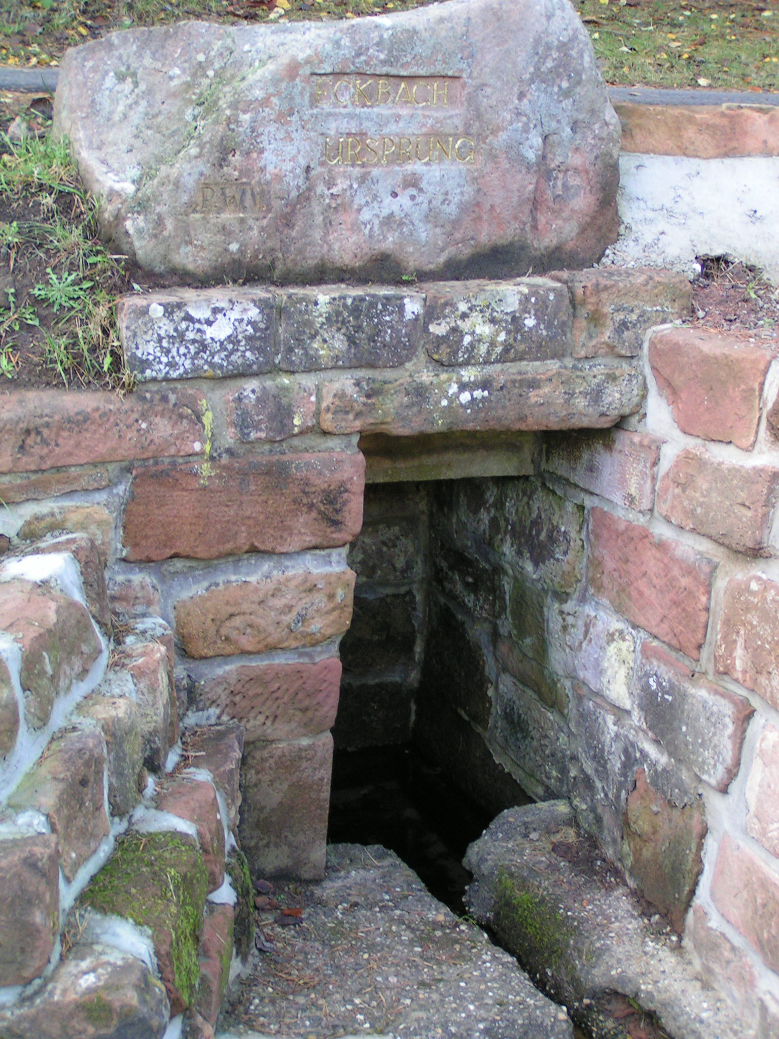 Eckbachquelle